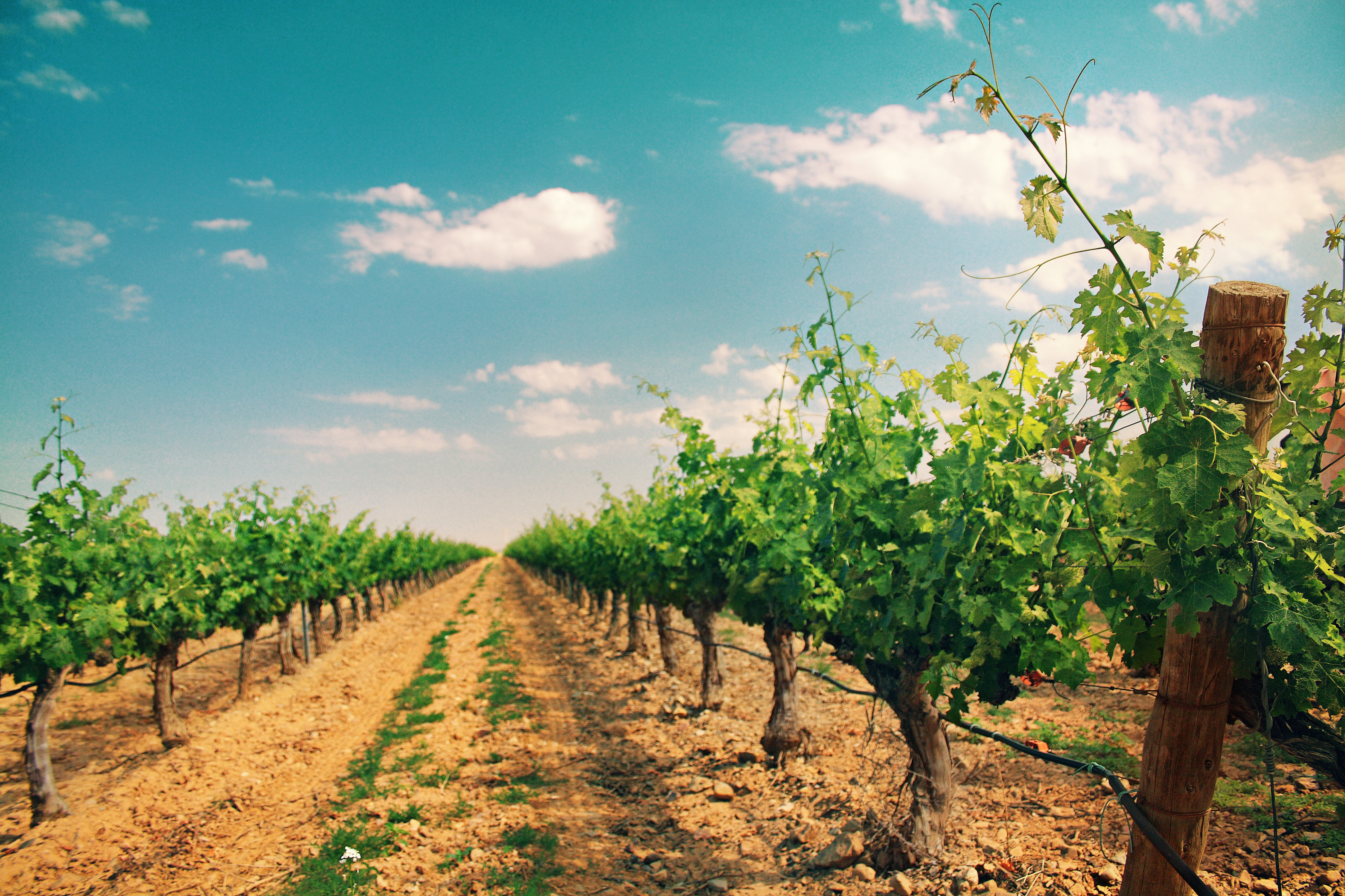 Vineyard Viñas Urbezo, Cariñena, España +info Big On Black